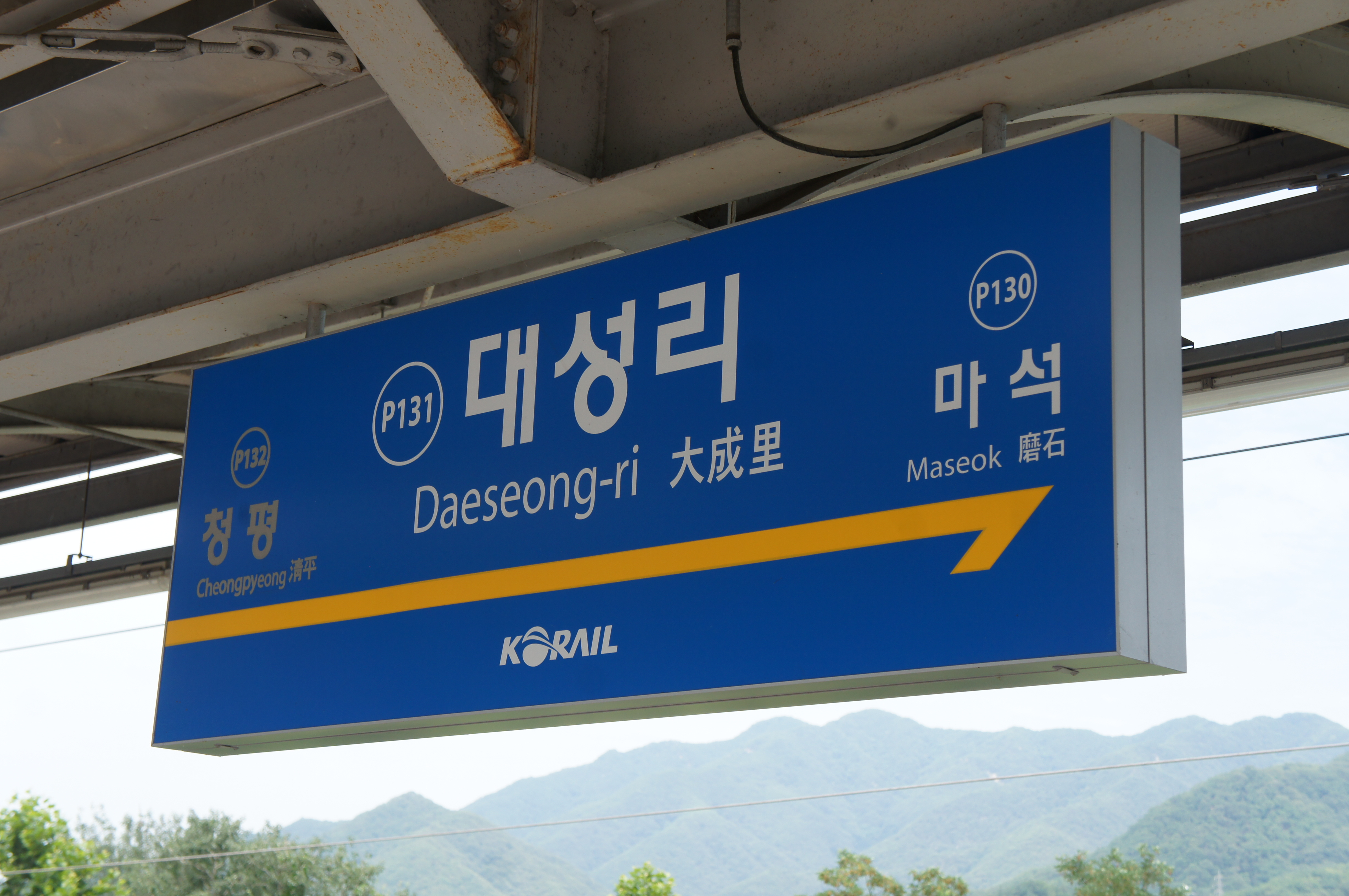 대성리역 역명판